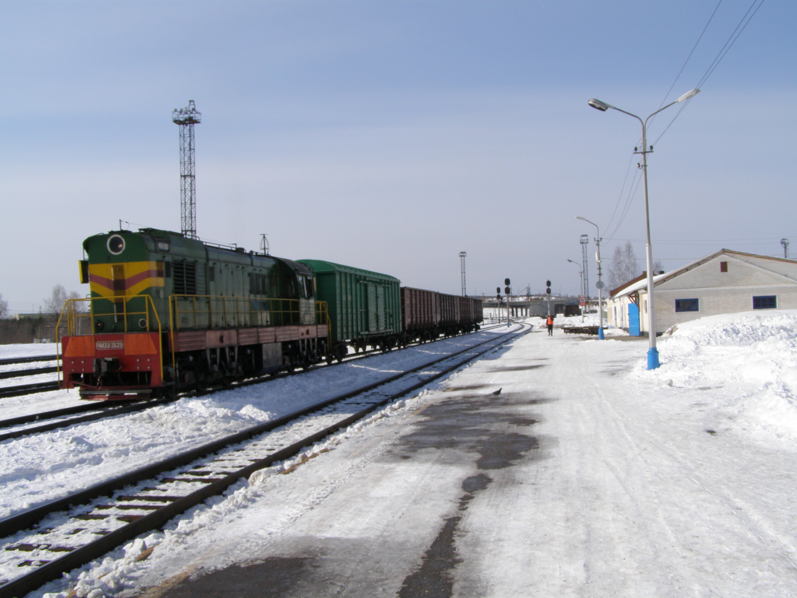 train